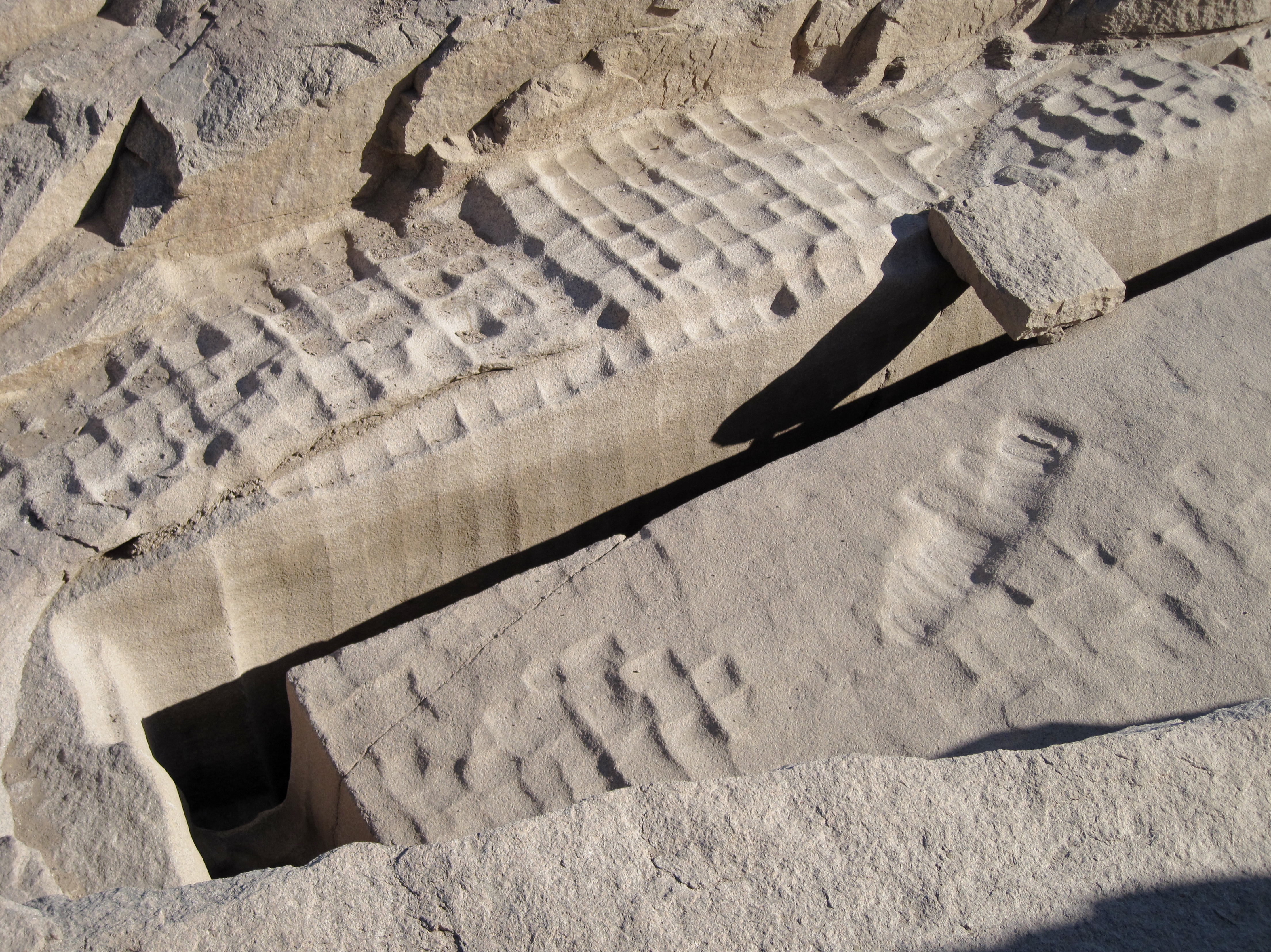 Unvollendeter Obelisk in Assuan, Ägypten